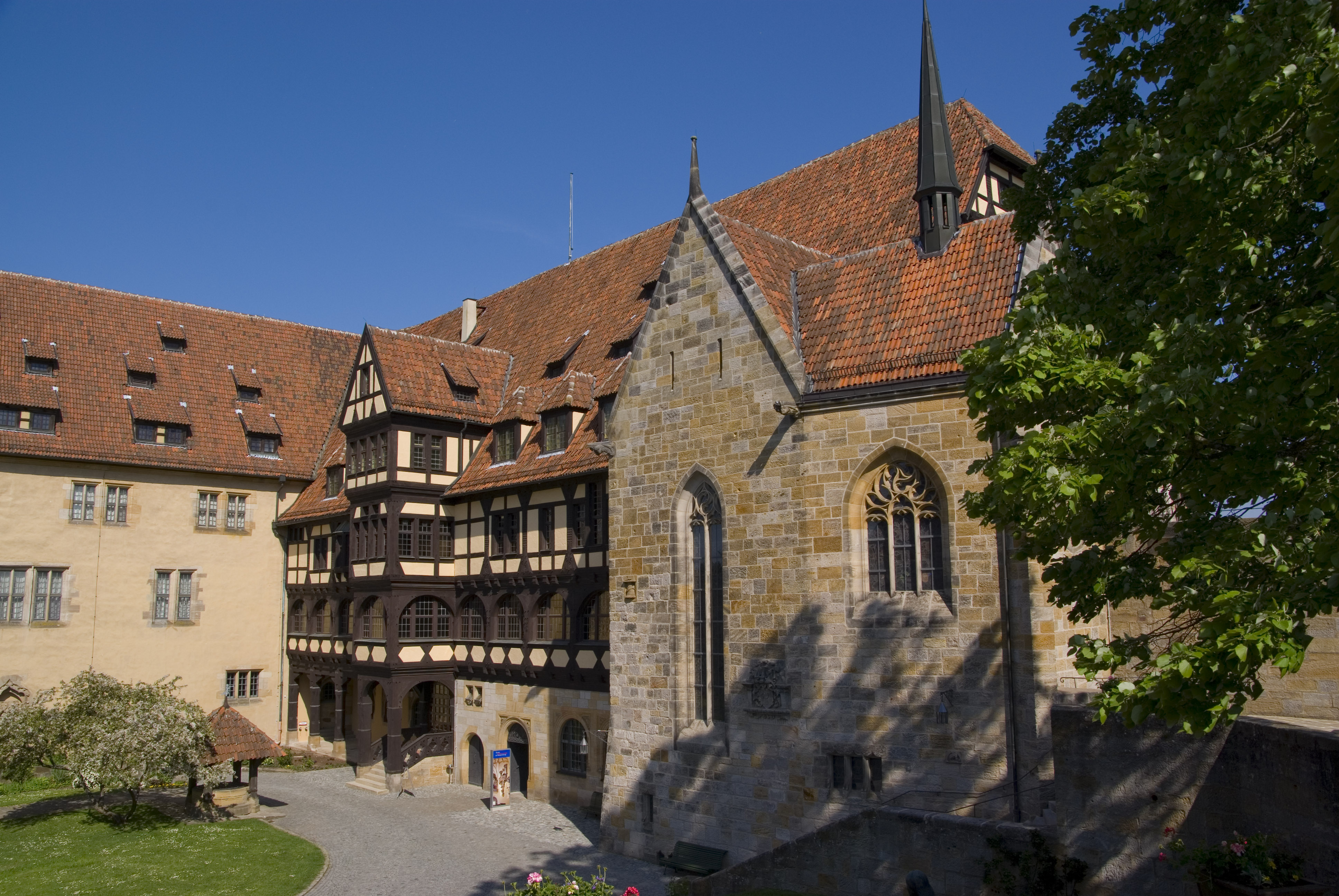 Veste Coburg